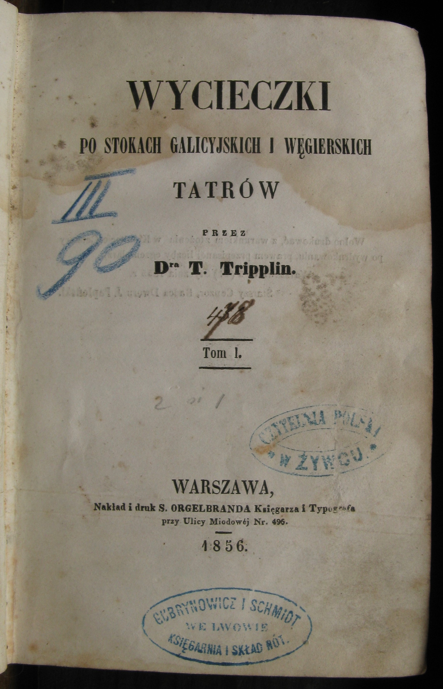 Strona tytułowa I tomu dzieła „Wycieczki po stokach galicyjskich i węgierskich Tatrów” Teodora Tripplina, wydanego w Warszawie nakładem Samuela Orgelbranda w 1856 roku (pierwsze wydanie).